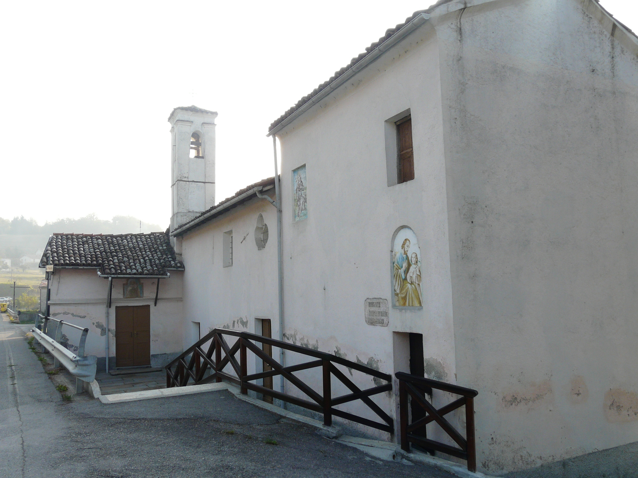 Chiesa dei Santi Rocco e Giuseppe, Murialdo, Liguria, Italia